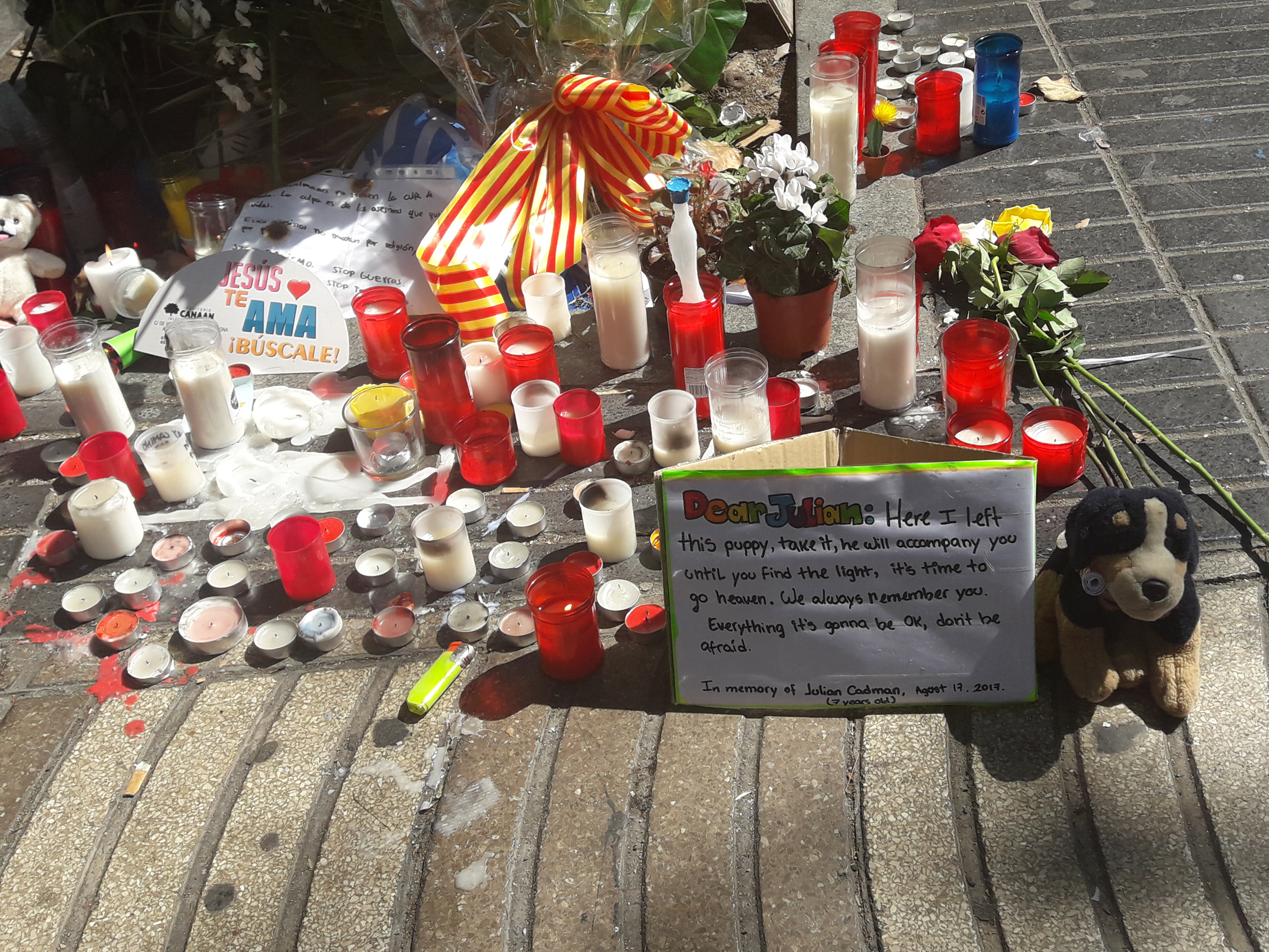 AtemptatBCN2017 Mostres condol. Julien Codman era un nen australià que va morir davant el Palau Moja.